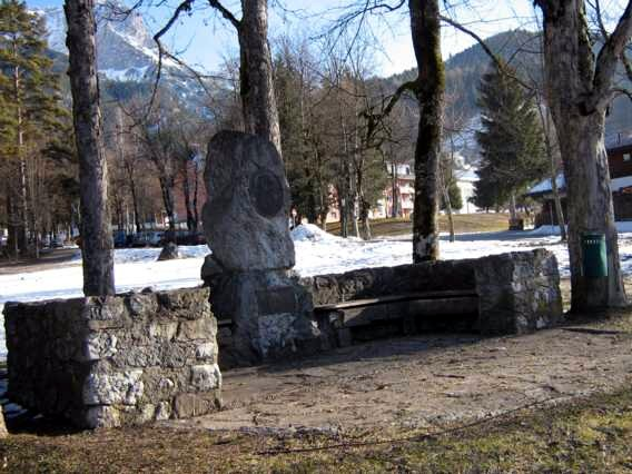 Denkmal für Turnvater Jahn im Ortsteil Bürgerau in Saalfelden (Österreich).